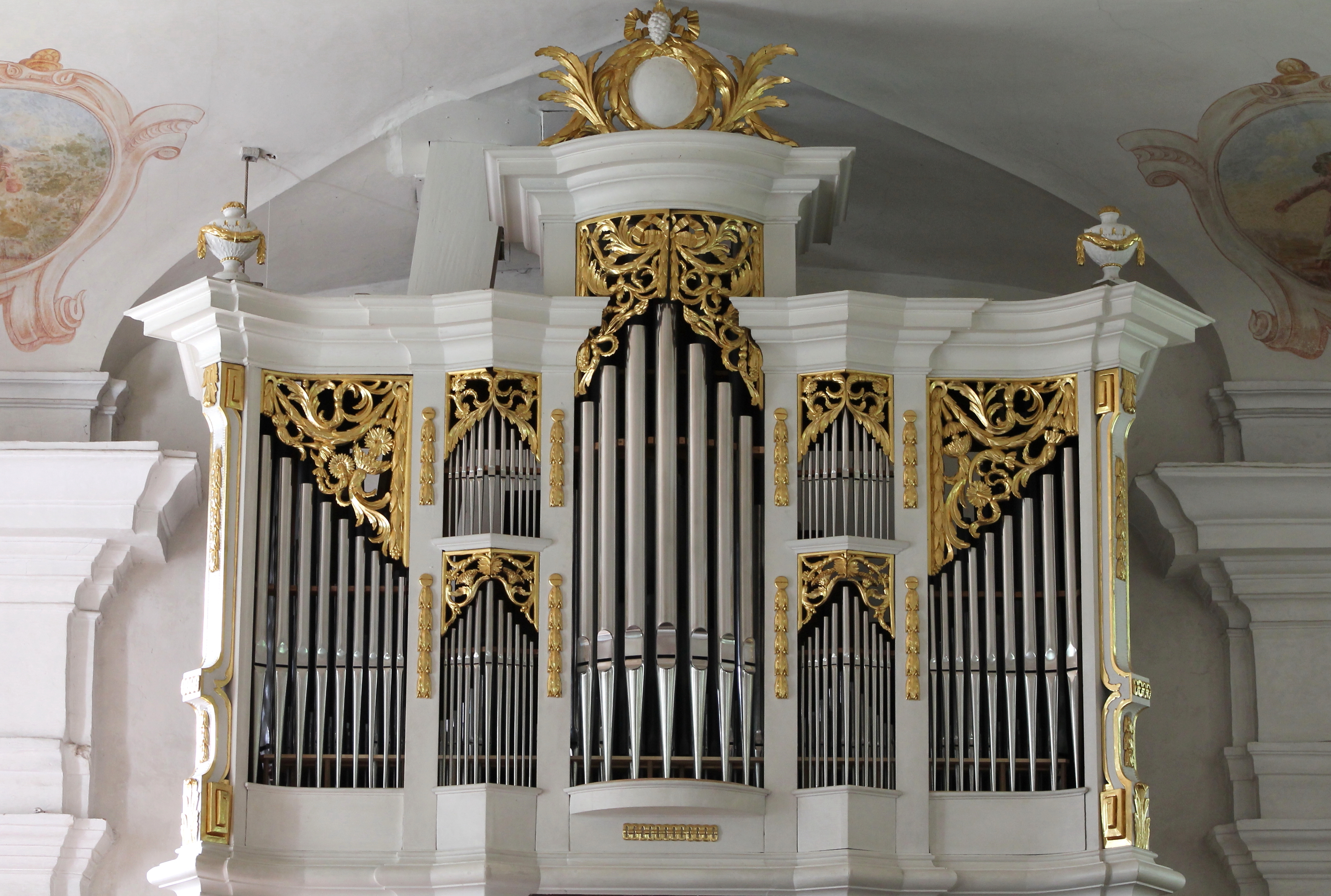 Hepp-Orgel (1803) in der Wallfahrtskirche Herz-Jesu Velburg (Photo: W.Sturm)